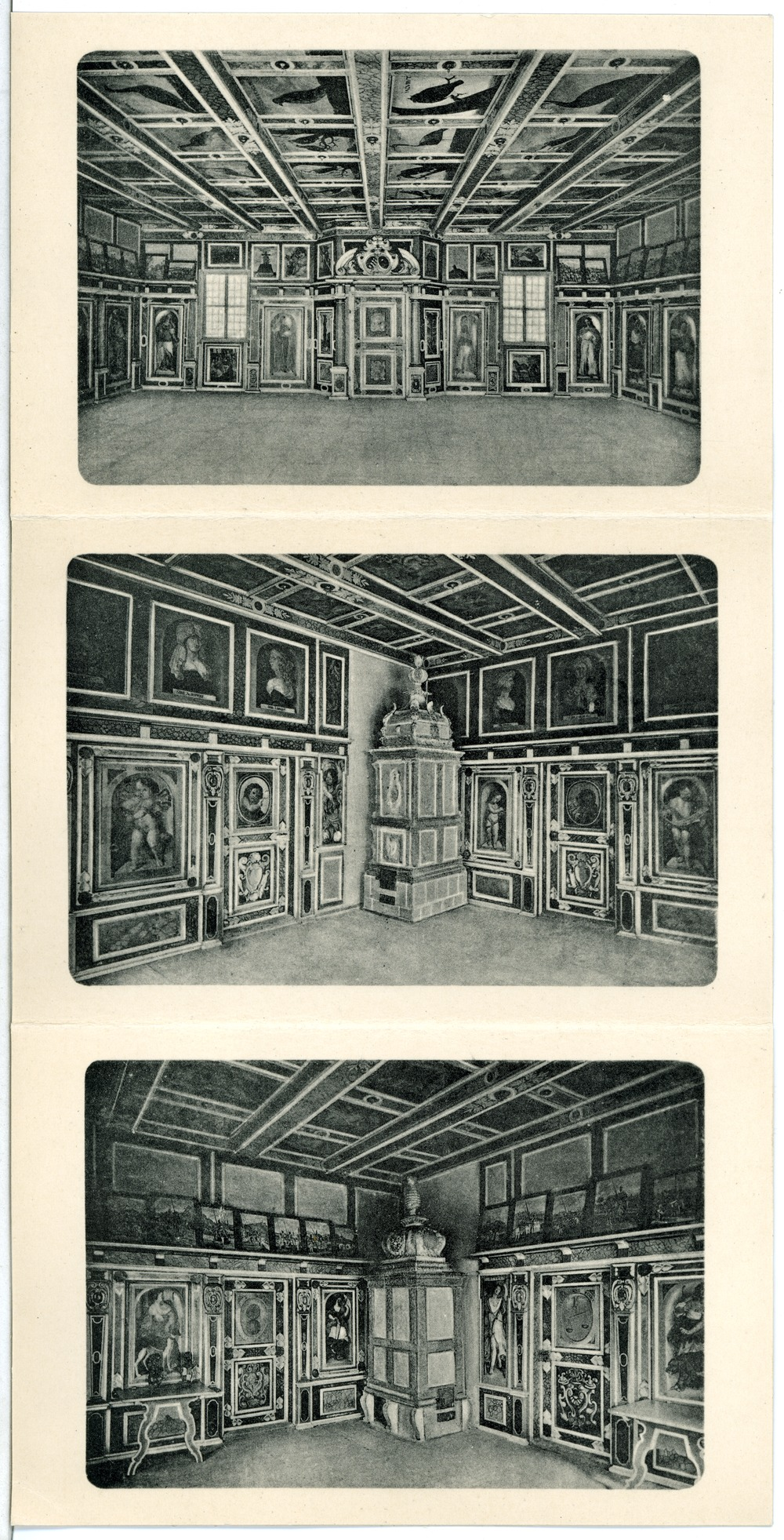 Radebeul; Schloß Hoflößnitz - Saal This postcard is from publisher Brück & Sohn in Meißen ( postcard has a unique number 11917 and is available in a higher resolution at the publisher. This images was uploaded in a cooperation project between Wikipedians and the publisher.